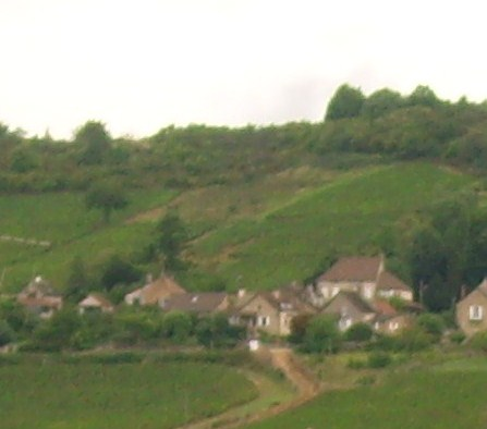 Vue d'une parties des vignes à Saint-Désert (71)